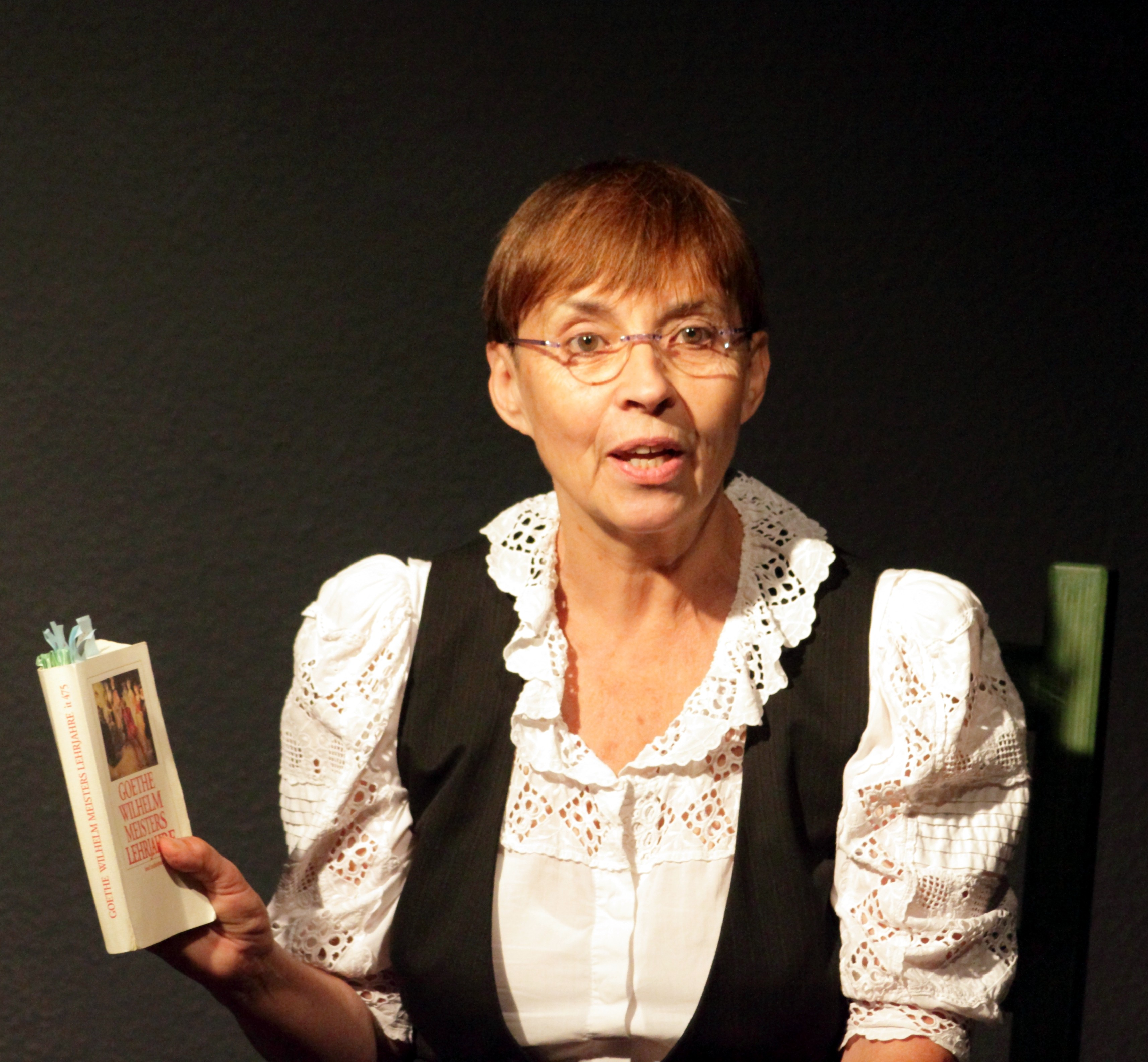 Die Puppenspielerin Rosi Lampe bei einer Lesung von Goethe-Texten